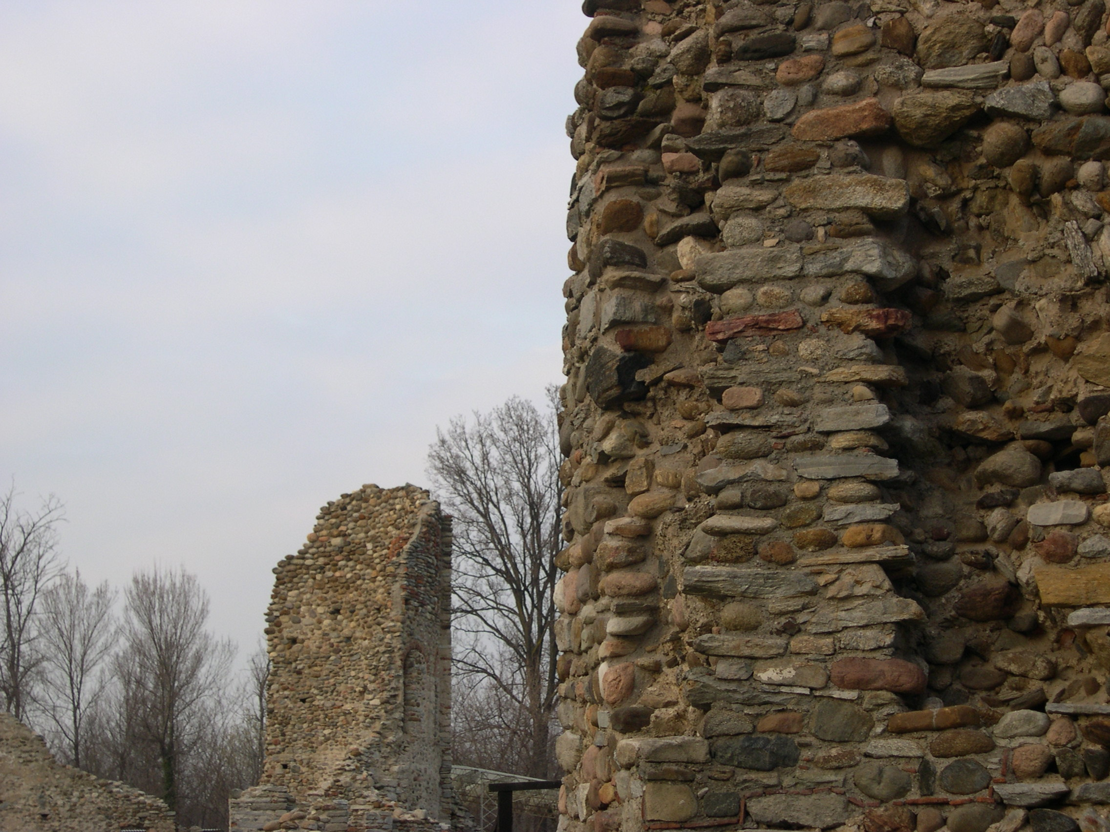 Rovine del Castrum di Castelseprio